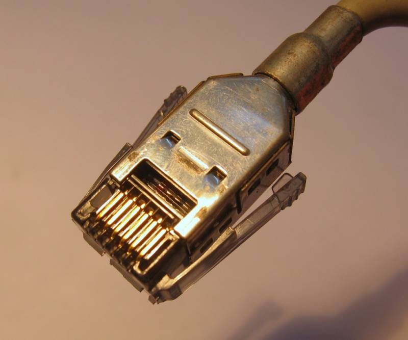 SDL 6 pin plug